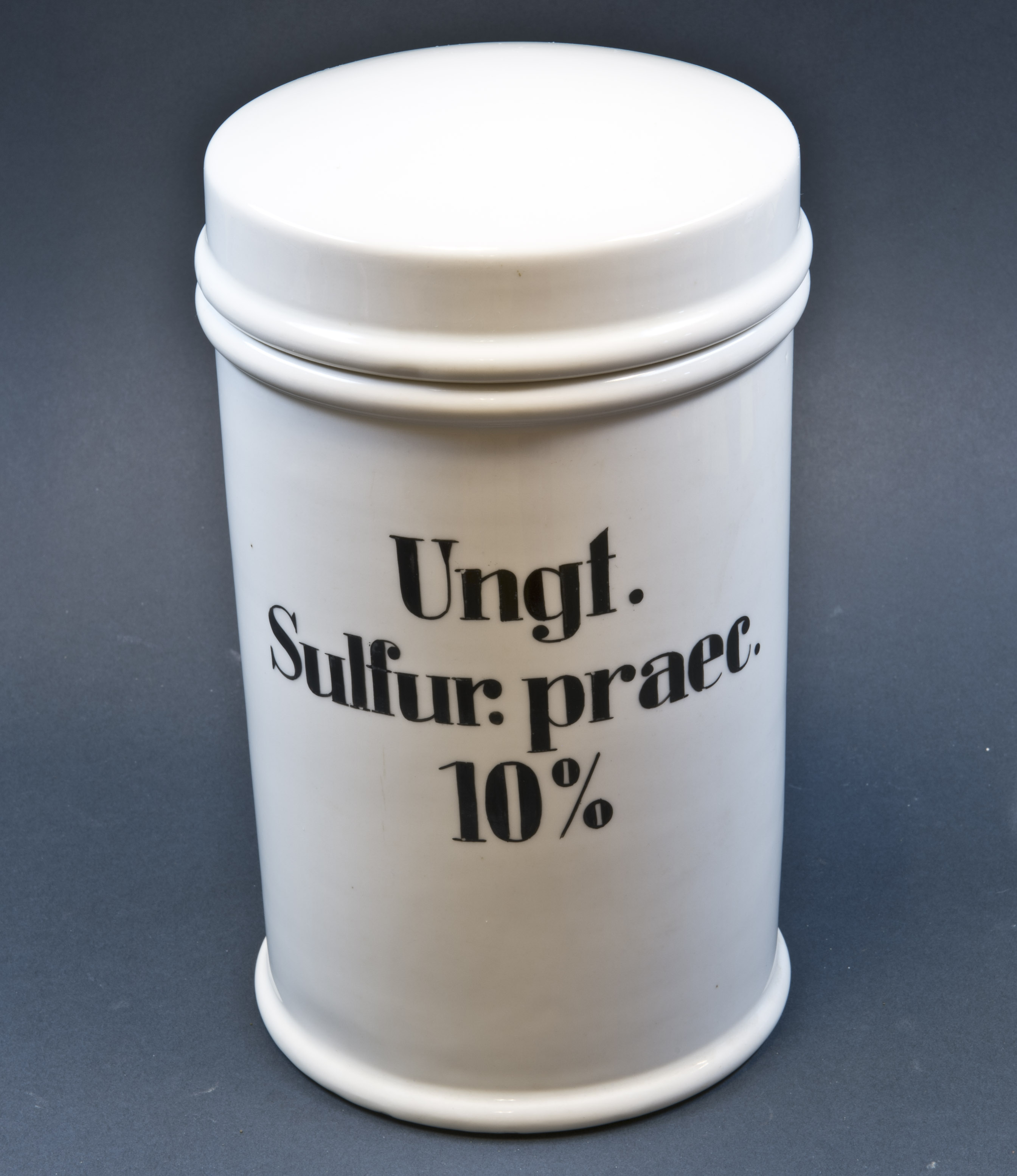 Apotheken-Gefäß aus weißem Porzellan Aufschrift: Ungt. Sulfur. praec. 10 % bedeutet: Unguentum sulfuratum praecipitatum = Schwefelsalbe gefällt Höhe: 26 cm, Durchmesser: 15 cm, Gewicht: 2,3 kg